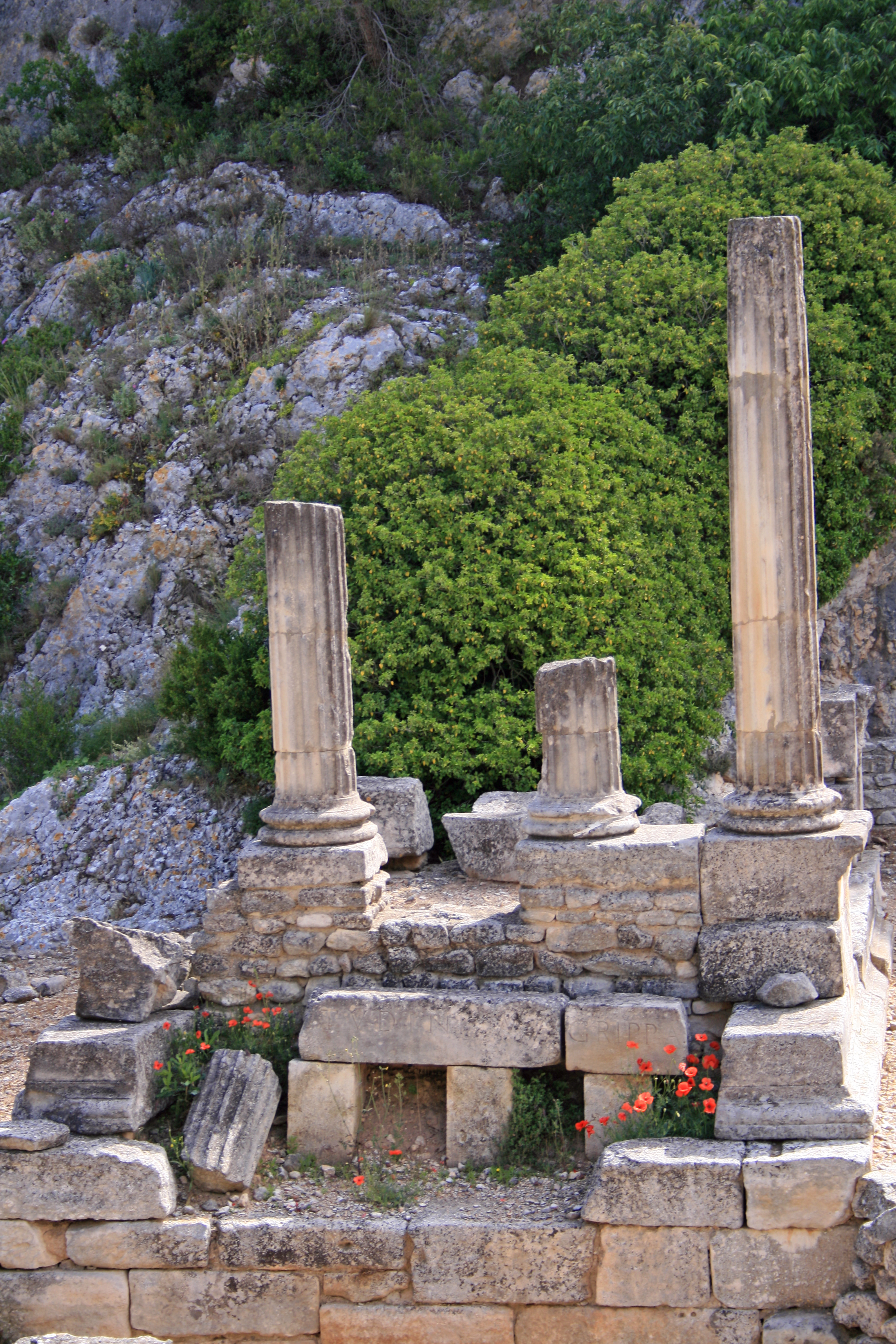 Glanum